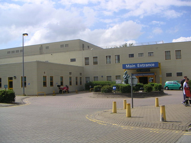 Milton Keynes General Hospital